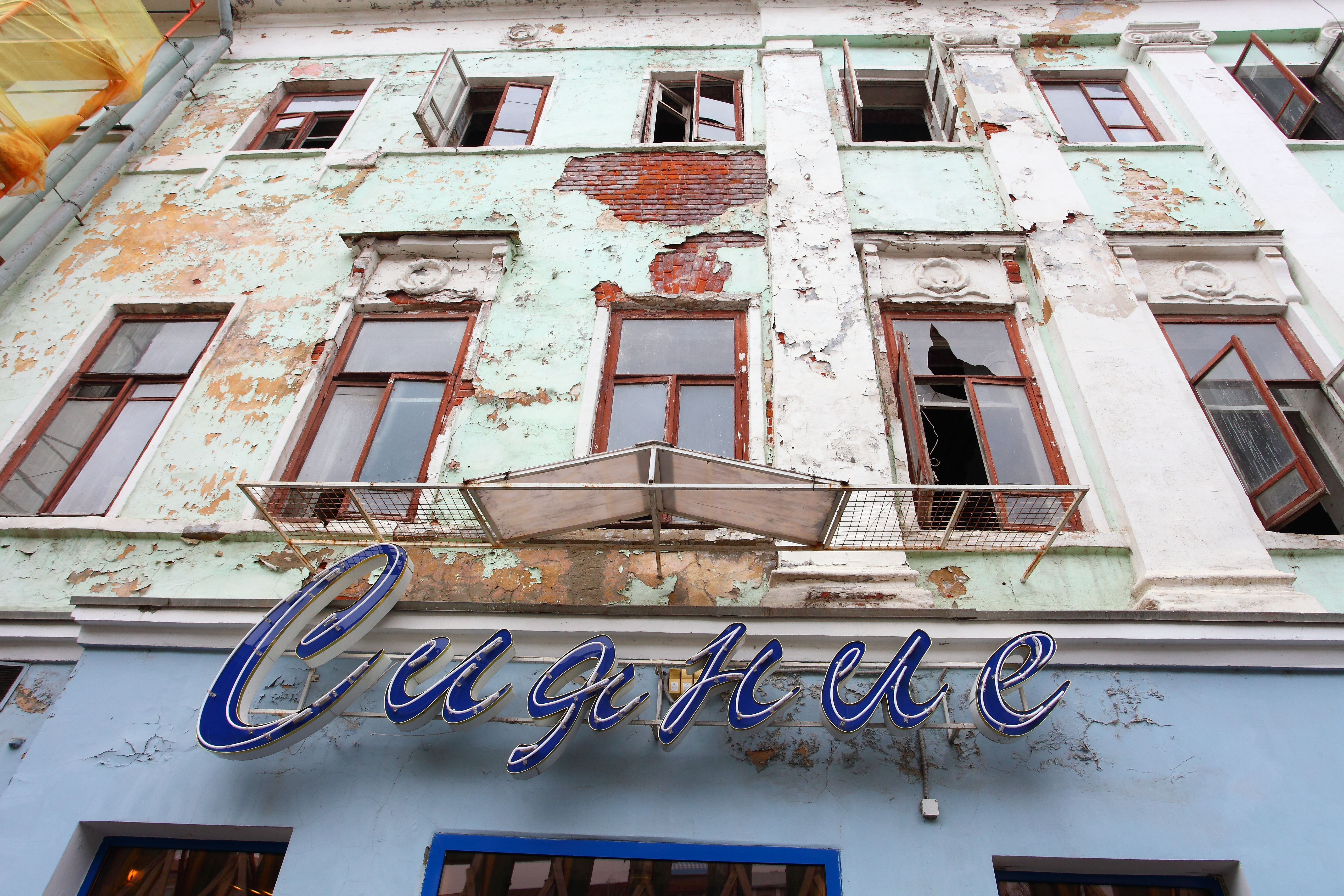 Доходный дом Иванова (Казань, ул.Баумана, 40) до реставрации, 2012 год